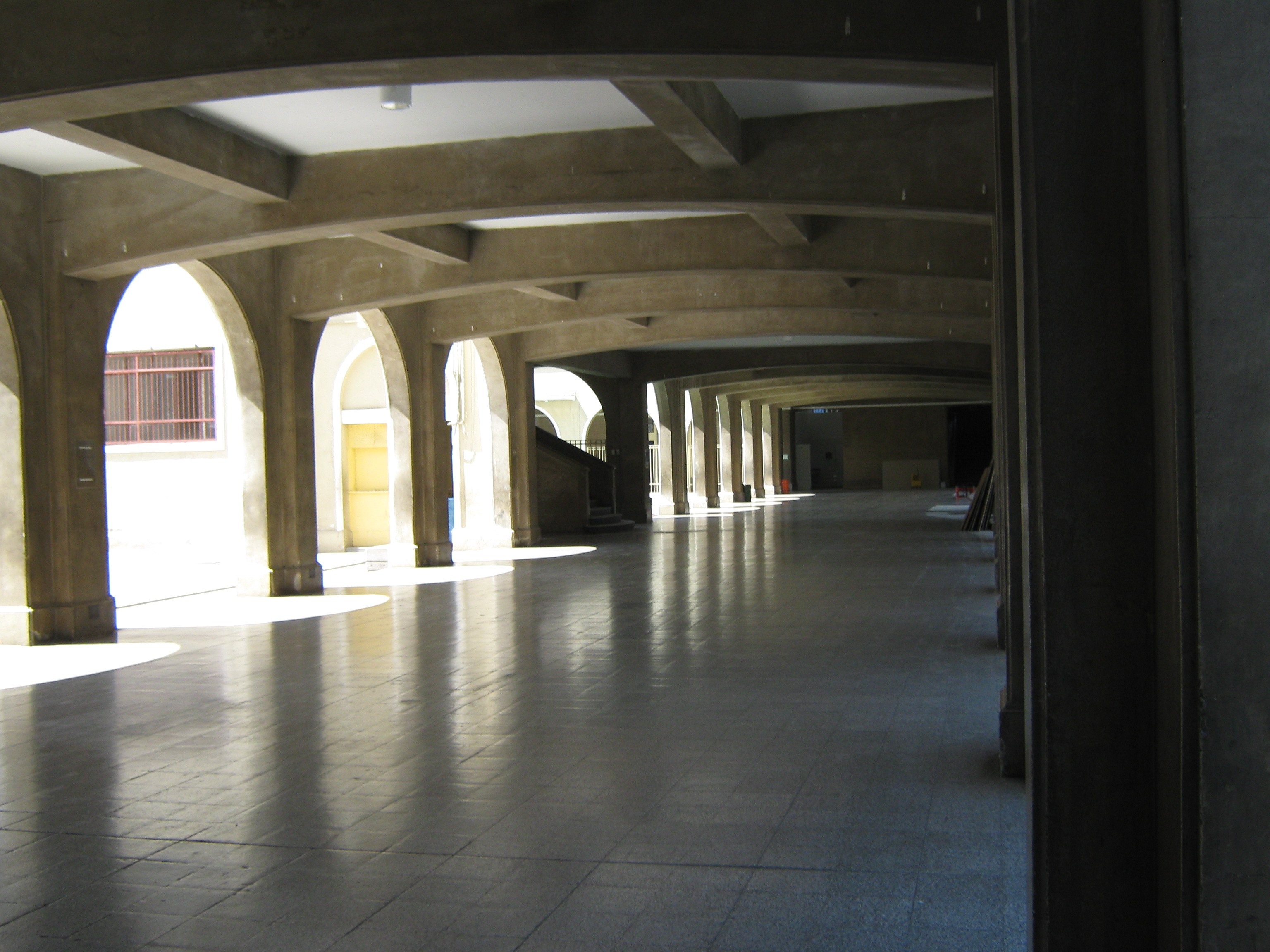 Imagen del Pasillo Central del Colegio San Ignacio. Parte de la Estructura de 1947, estructura cuya construcción estuvo a cargo de San Alberto Hurtado, profesor del Colegio en ese entonces, y cuyo diseño fue hecho por dos arquitectos ex alumnos del Colegio